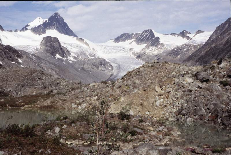 Image du Keele Peak prise depuis l'extrémité Sud du lac en 2005